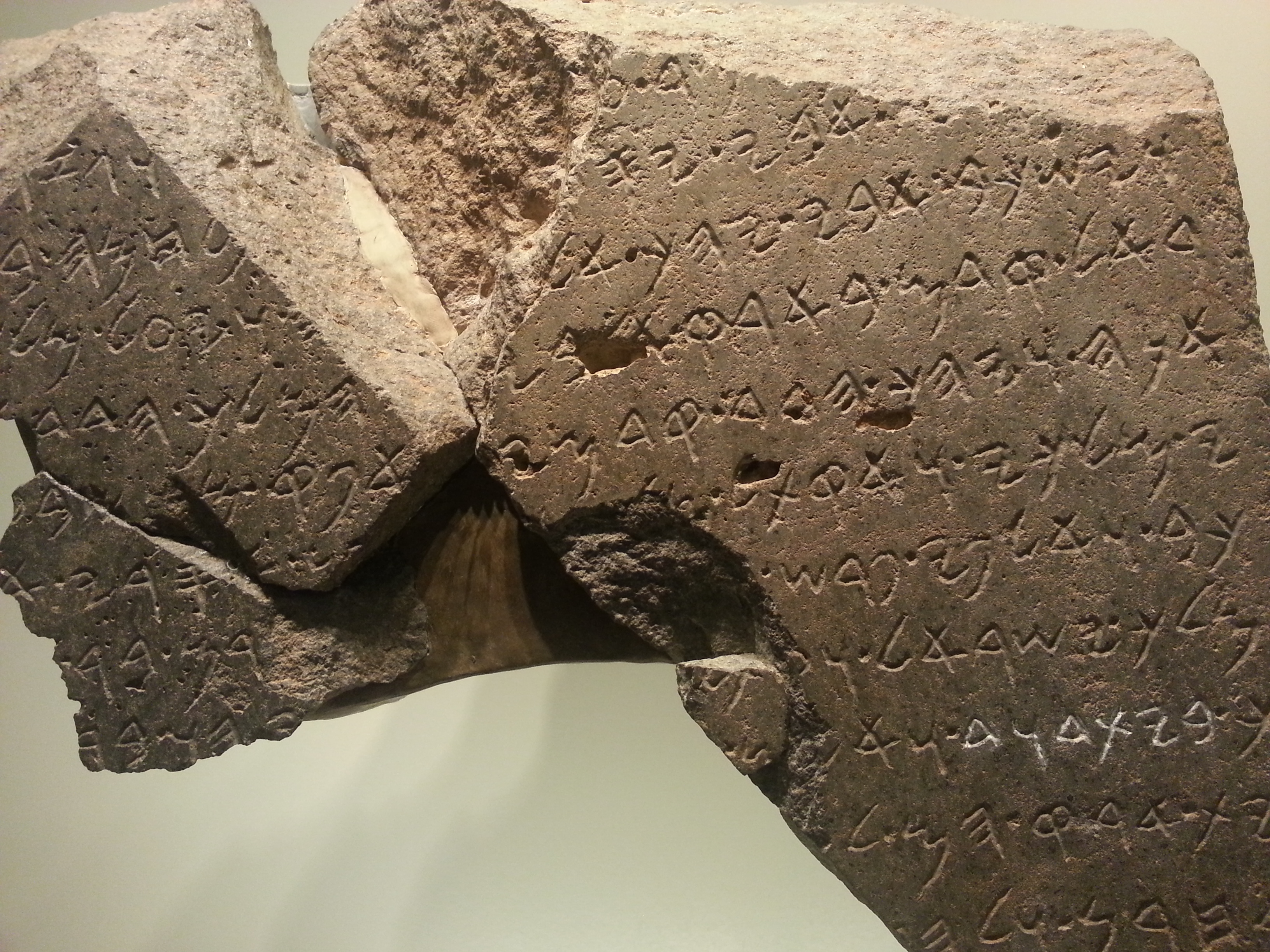 תקריב 3 - כתובת תל דן עם הפסוק: "וימשחו שם את דוד למלך"; פריט בתצוגת מוזאון ישראל בירושלים